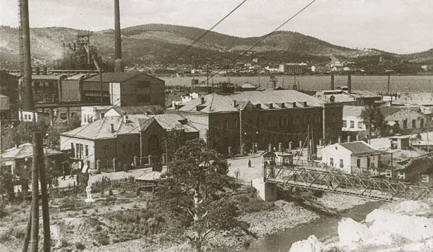 Белорецкий комбинат в 1942 году